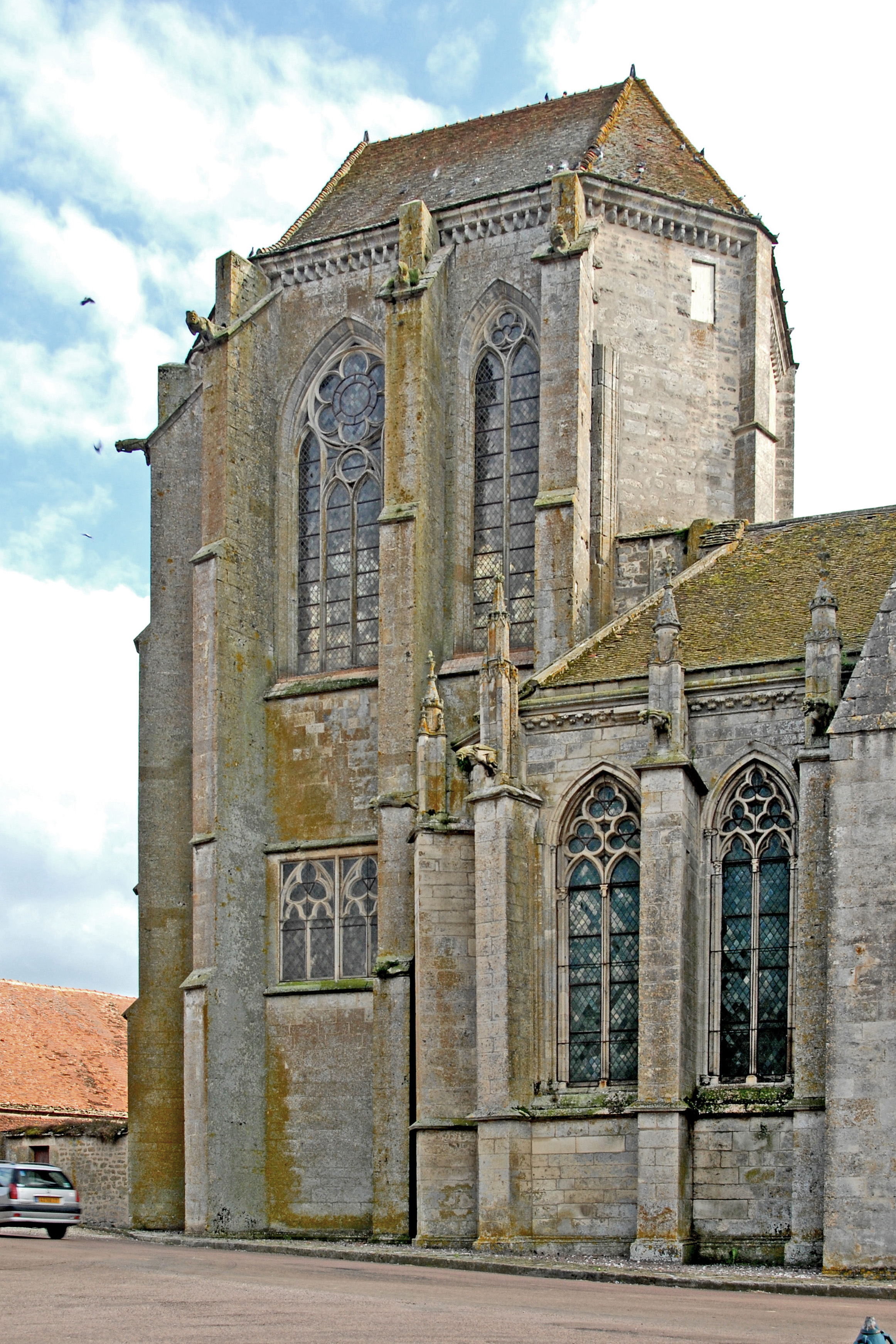 St-Thibault de Saint-Thibault,Chor, Nordseite